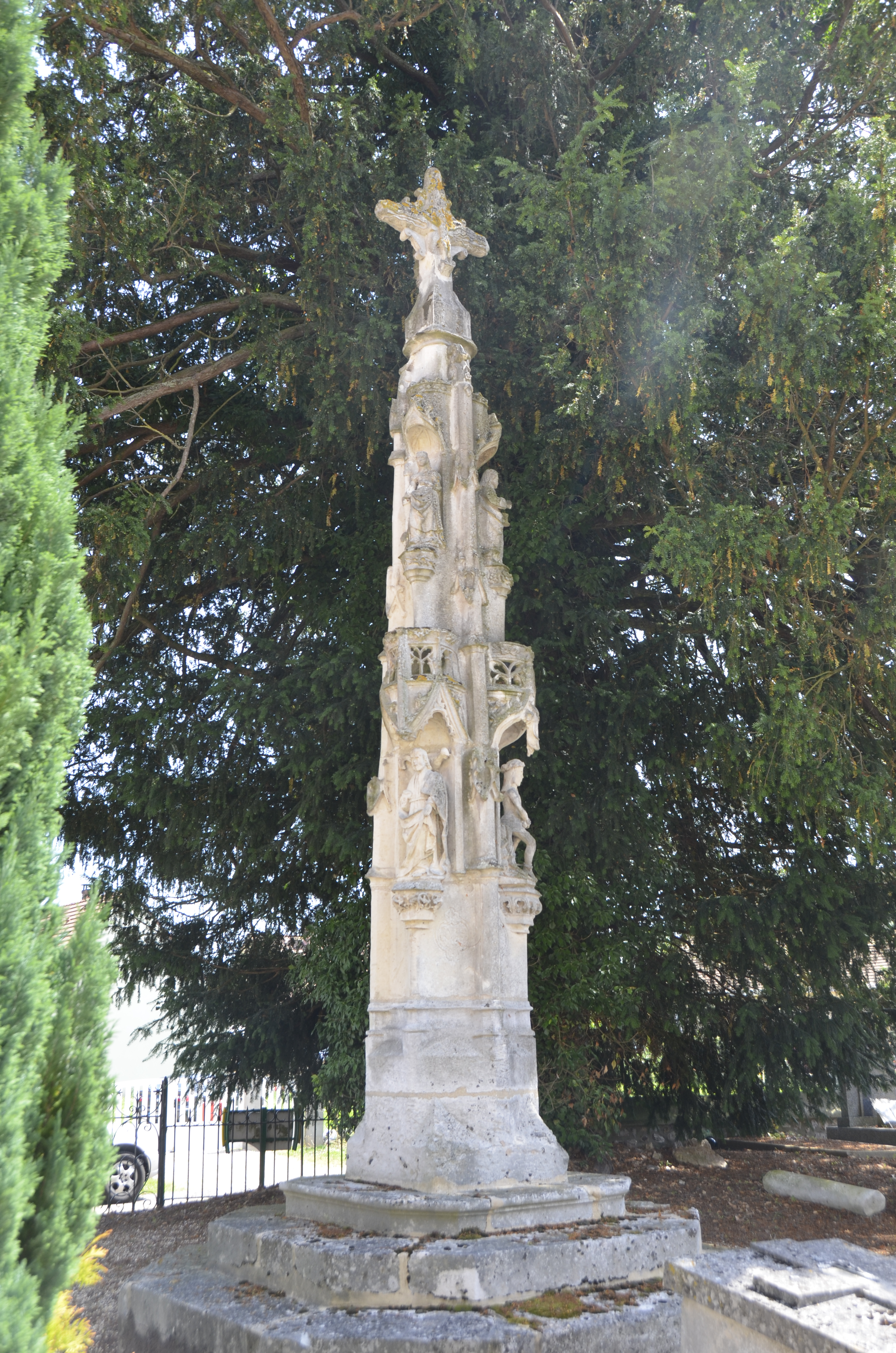 Calvaire de Saint-Pierre-du-Bosguérard ,vue coté est.